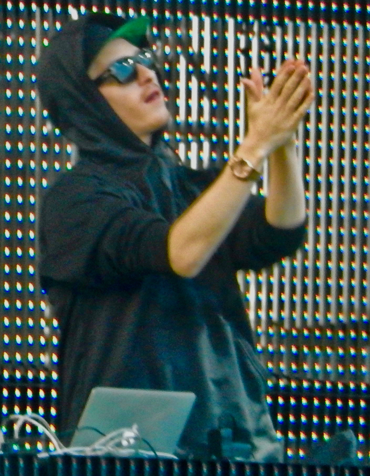 Flosstradamus